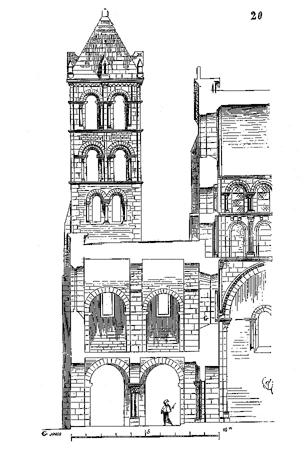 Sacre-Cheur de nPray-le-Monial, Westwerk, Grafik